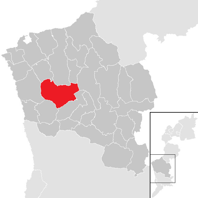 Bezirk Oberwart